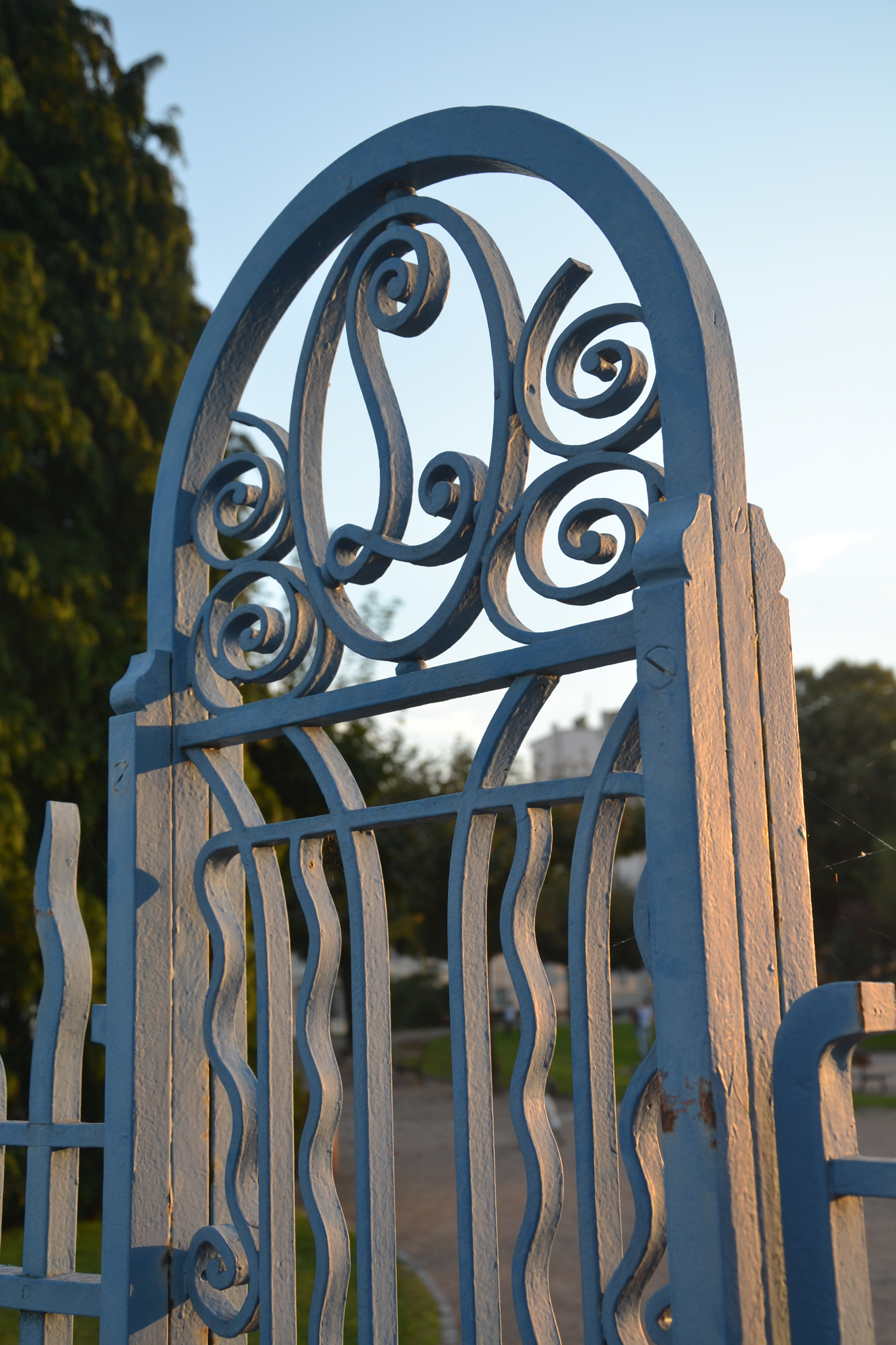 Grille Art Déco du jardin du Champ de Juillet à Limoges (Haute-Vienne, France).